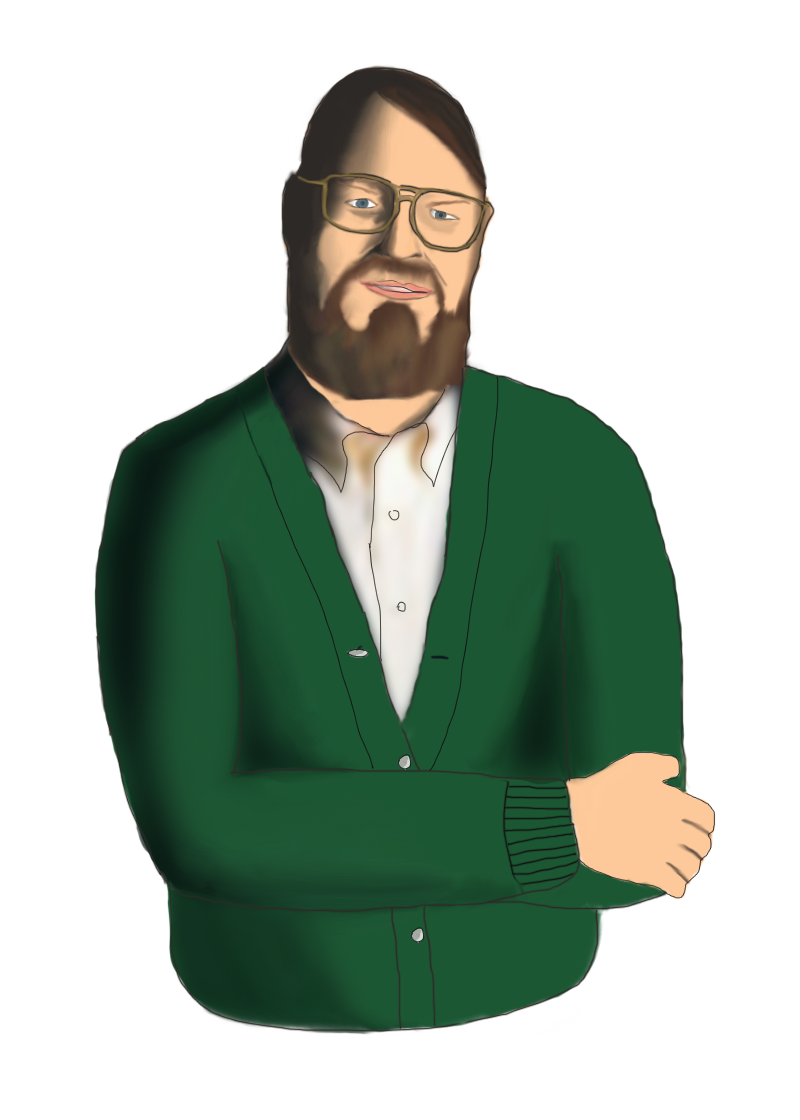 Ritratto dell'informatico Jim Blinn realizzato da davi.trip